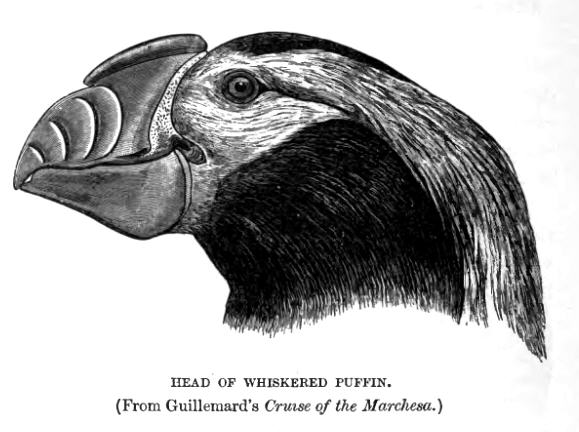 Whiskered Puffin